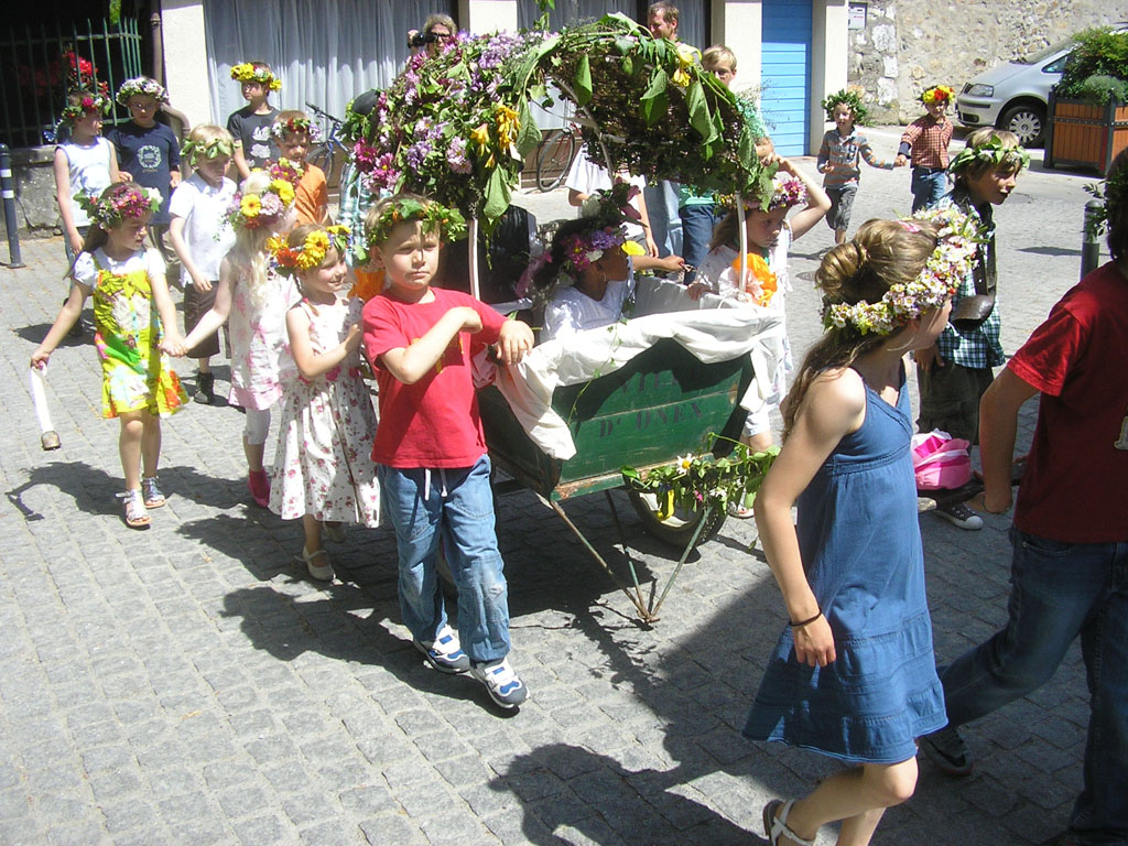 Cortège du « Feuillu » dans le Vieil-Onex, commune d'Onex à Genève. Les « mariés » sont dans une charrette tirée par d'autres enfants (la charrette porte l'inscription « Ville d'Onex »). Réintroduction en 2011 de la tradition locale, perdue depuis la fin des années 1960.